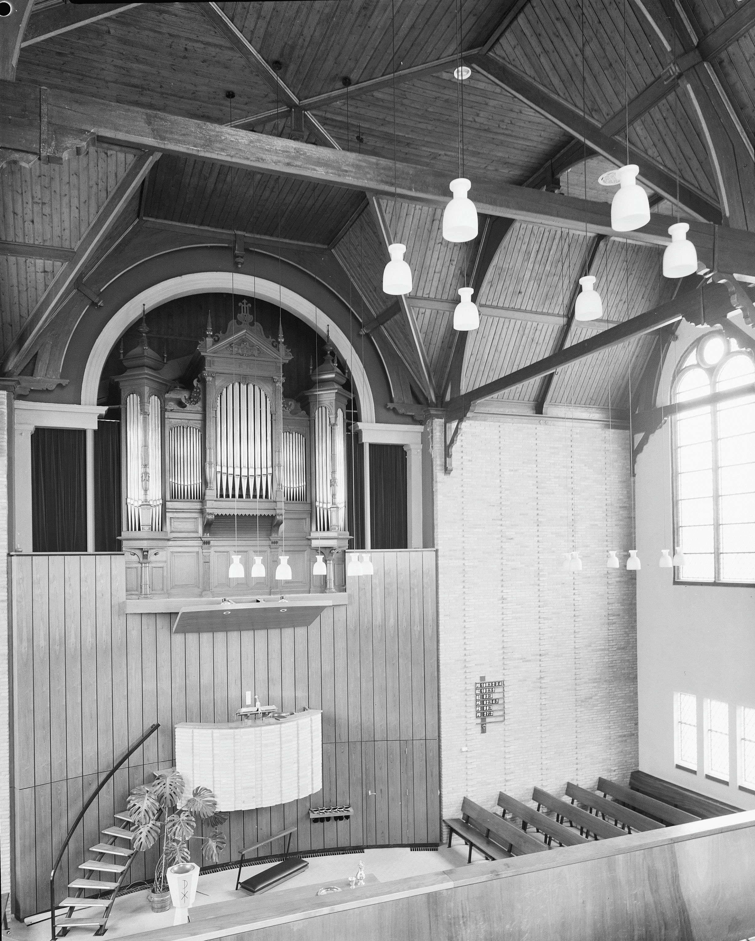 Geref. Kerk: interieur